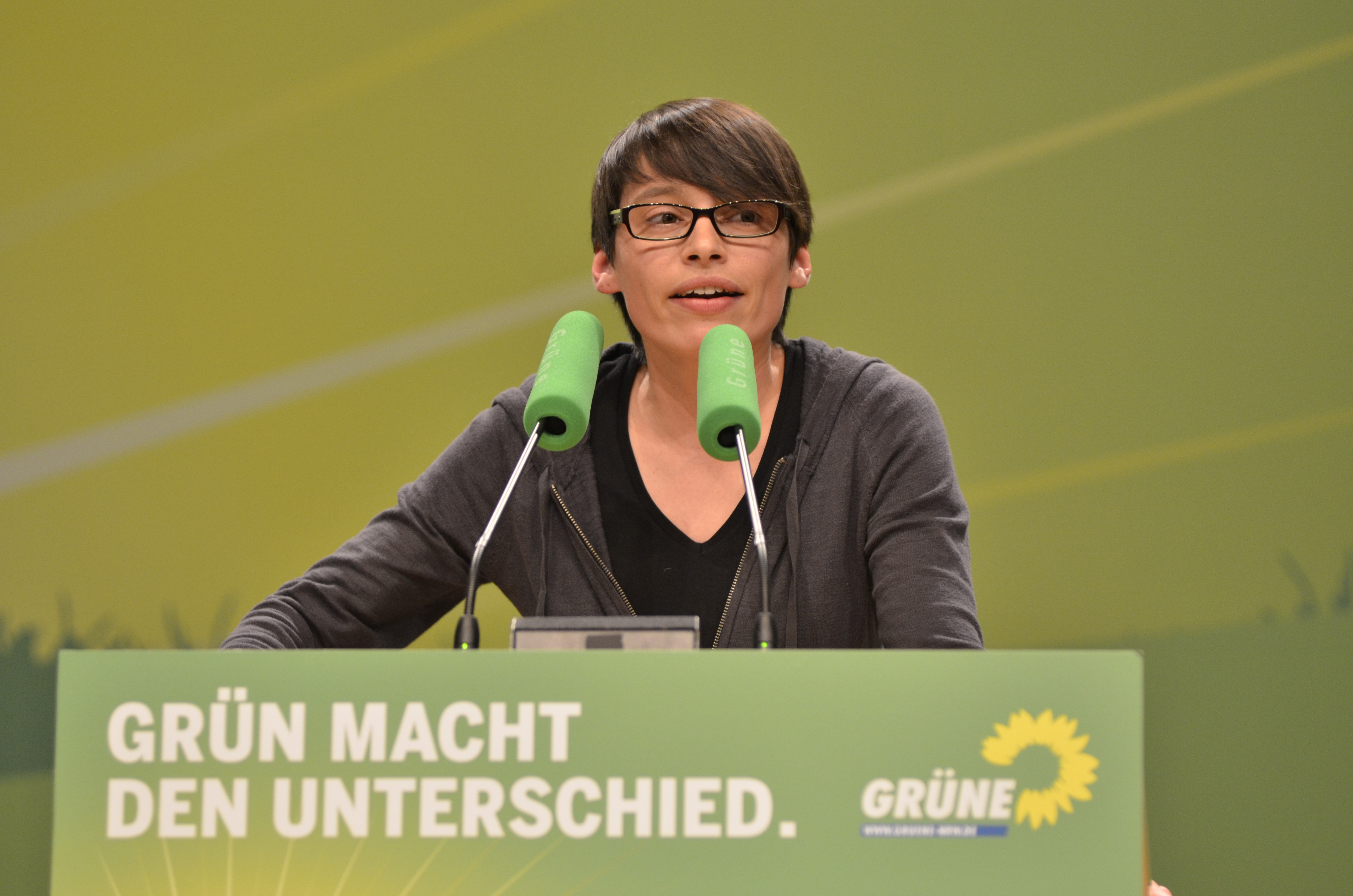 Josefine Paul